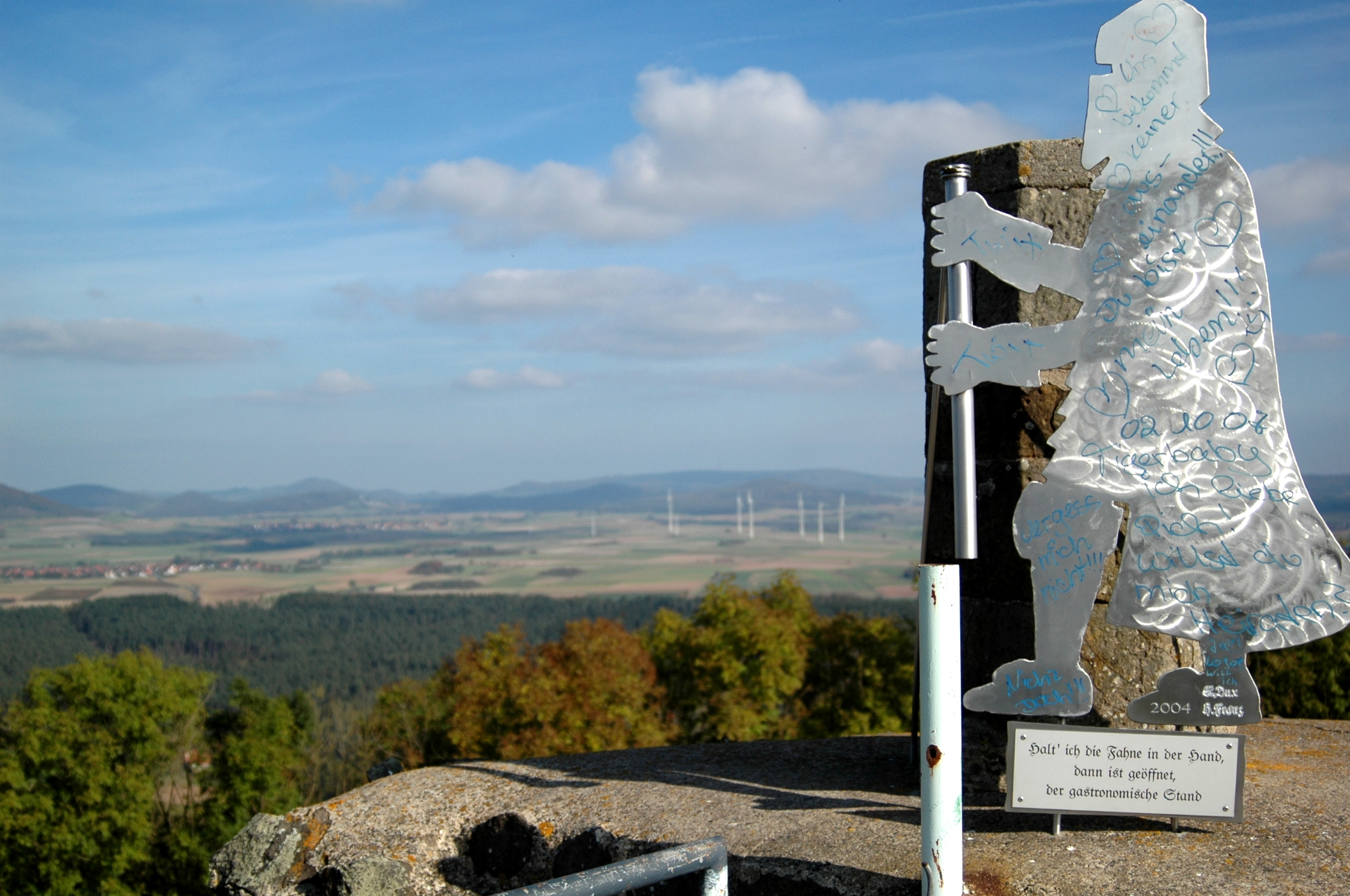 Aussicht von der Weidelsburg bei Ippinghausen, Wolfhagen